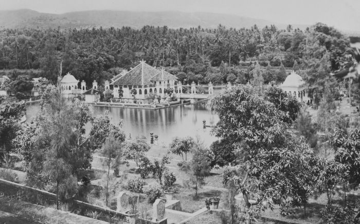 foto. Het waterpaleis bij Oedjoeng